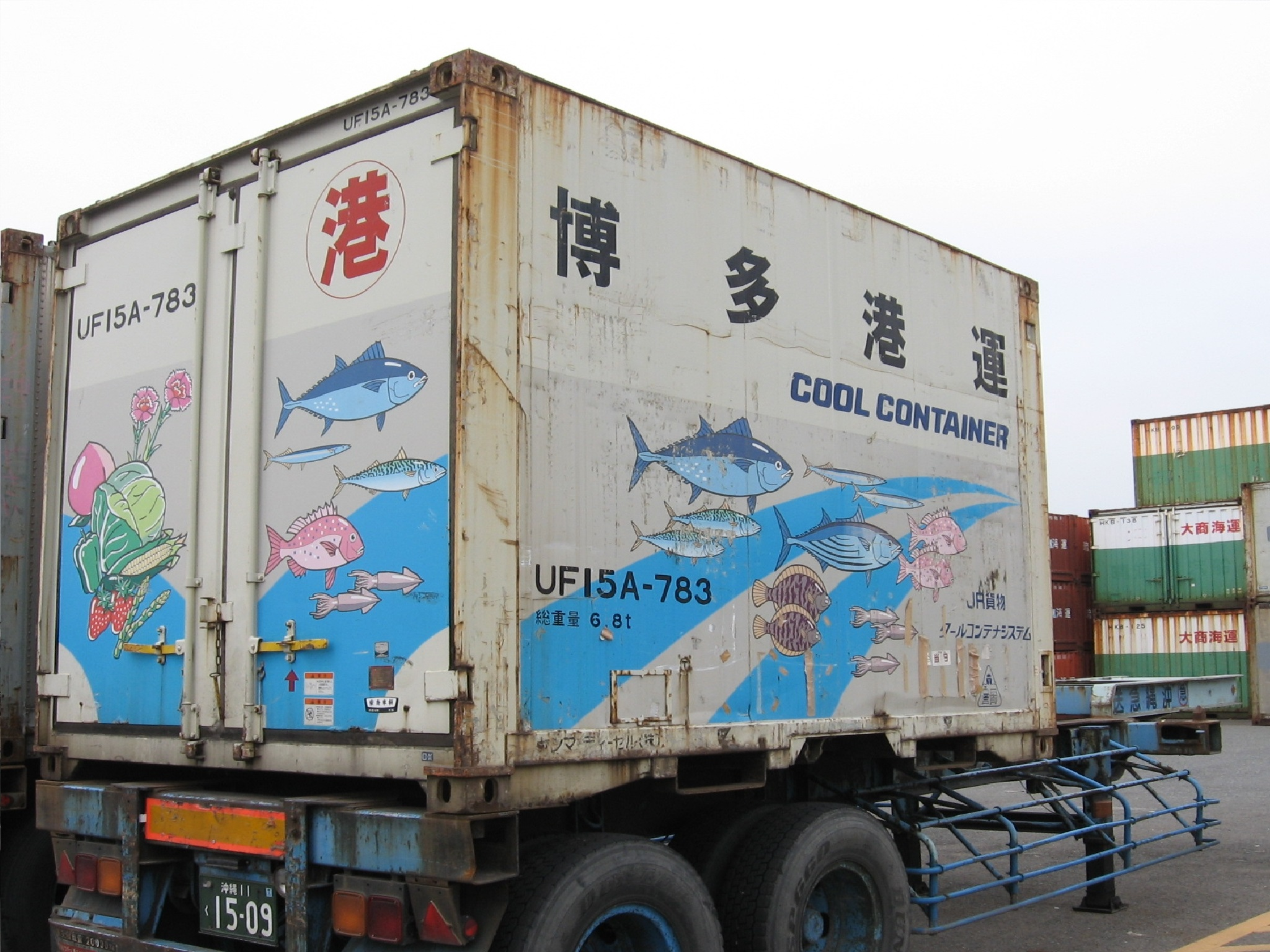 JR貨物より日本国内での鉄道輸送用に承認登録されて、民間企業が所有及び使用している 「 鉄道私有コンテナ 」 。 撮影地＝【福岡／香椎PP】